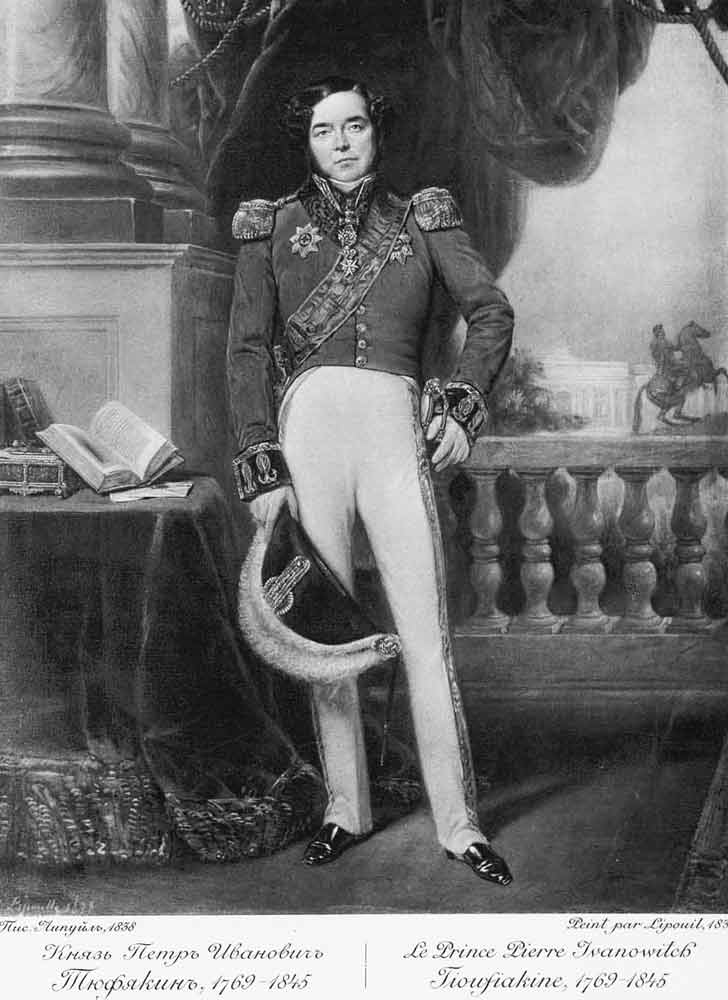 Prince Pierre Ivanowitch Tioufiakine